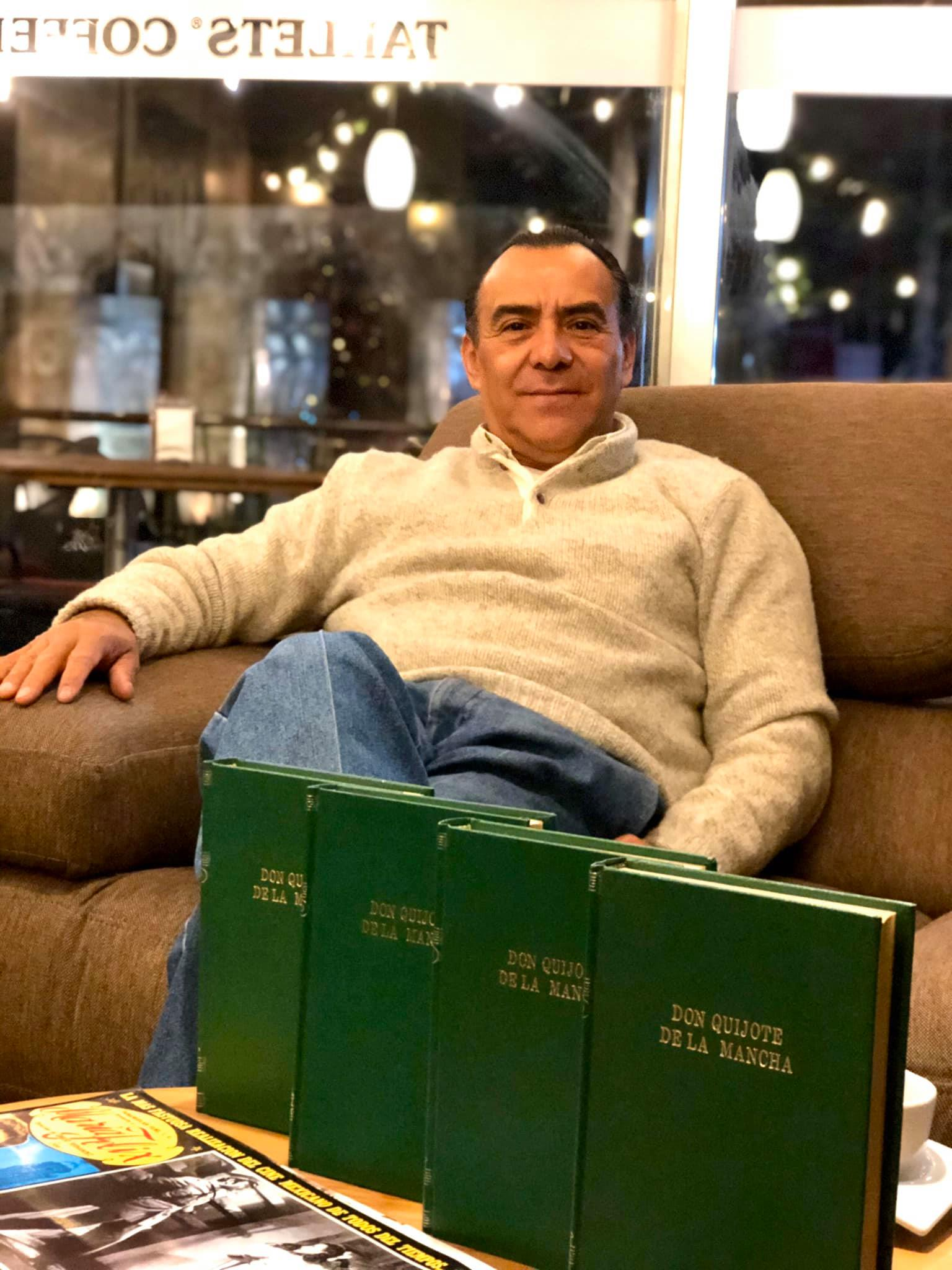 Ha sido Legislador Local del Estado de Puebla en dos ocasiones.